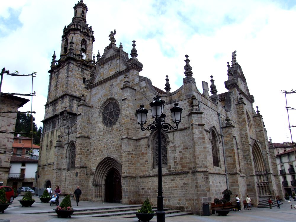 Balmaseda (Guipúzcoa)-Iglesia de San Severino-1